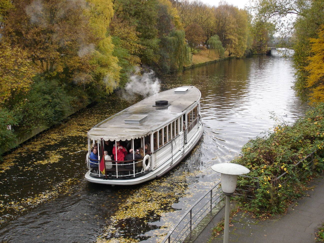 Alsterdampfer "St. Georg" auf dem Mundsburger Kanal, aufgenommen von der Kuhmühlenbrücke am 2004-10-31. Eigene Aufnahme, GNU-FDL